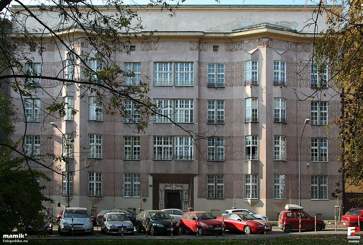 Kamienica profesorska na placu Inwalidów. Oryginalna kolorystyka fasady była czarno-biała